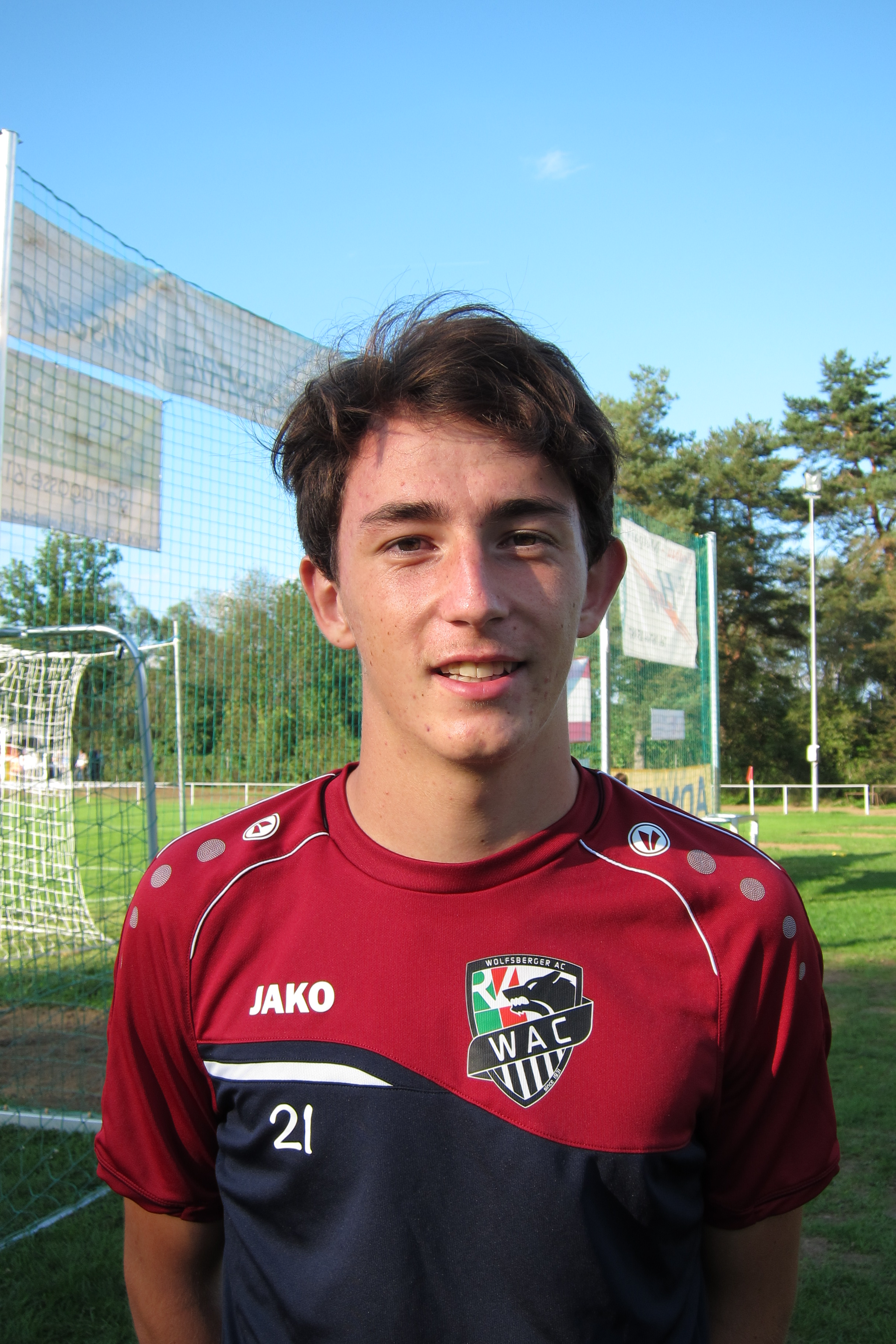 Joshua Steiger (WAC)